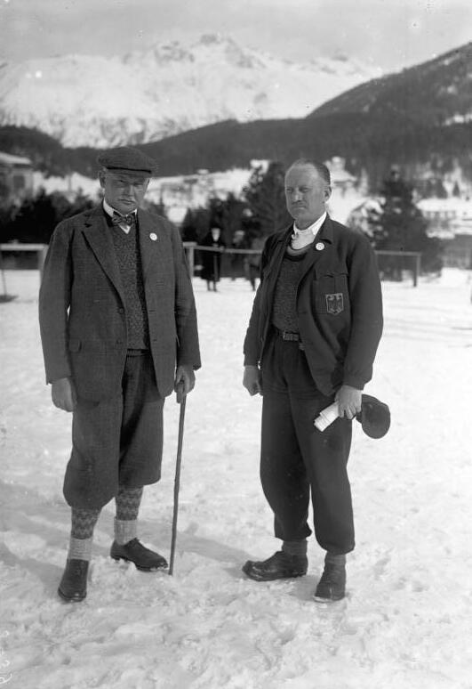 Die Führer der deutschen Olympiamannschaft Staatsekretär Lewald(links) und Dr. Diem (rechts) in St. Moritz.